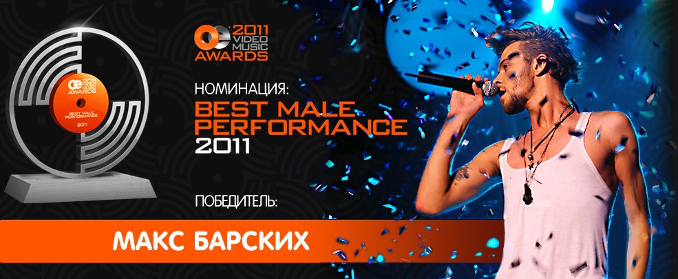 Номинация BEST MALE PERFORMANCE